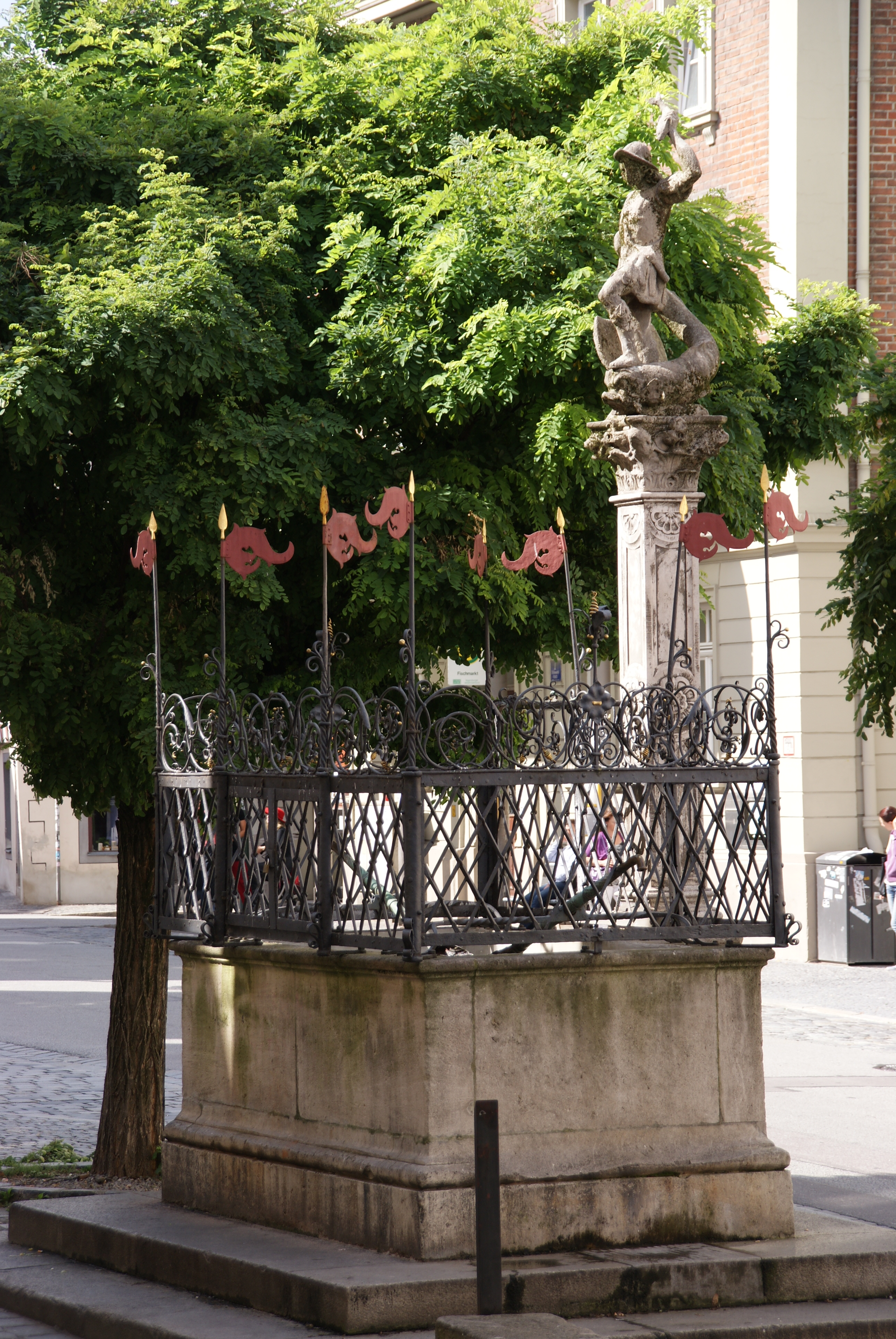 Sog. Fischmarktbrunnen, Steintrog mit Gitter und Brunnenstock mit allegorischer Figur, Renaissance, frühes 17. Jh., Gitter um 1590, Figur Kopie 1904This is a photograph of an architectural monument.